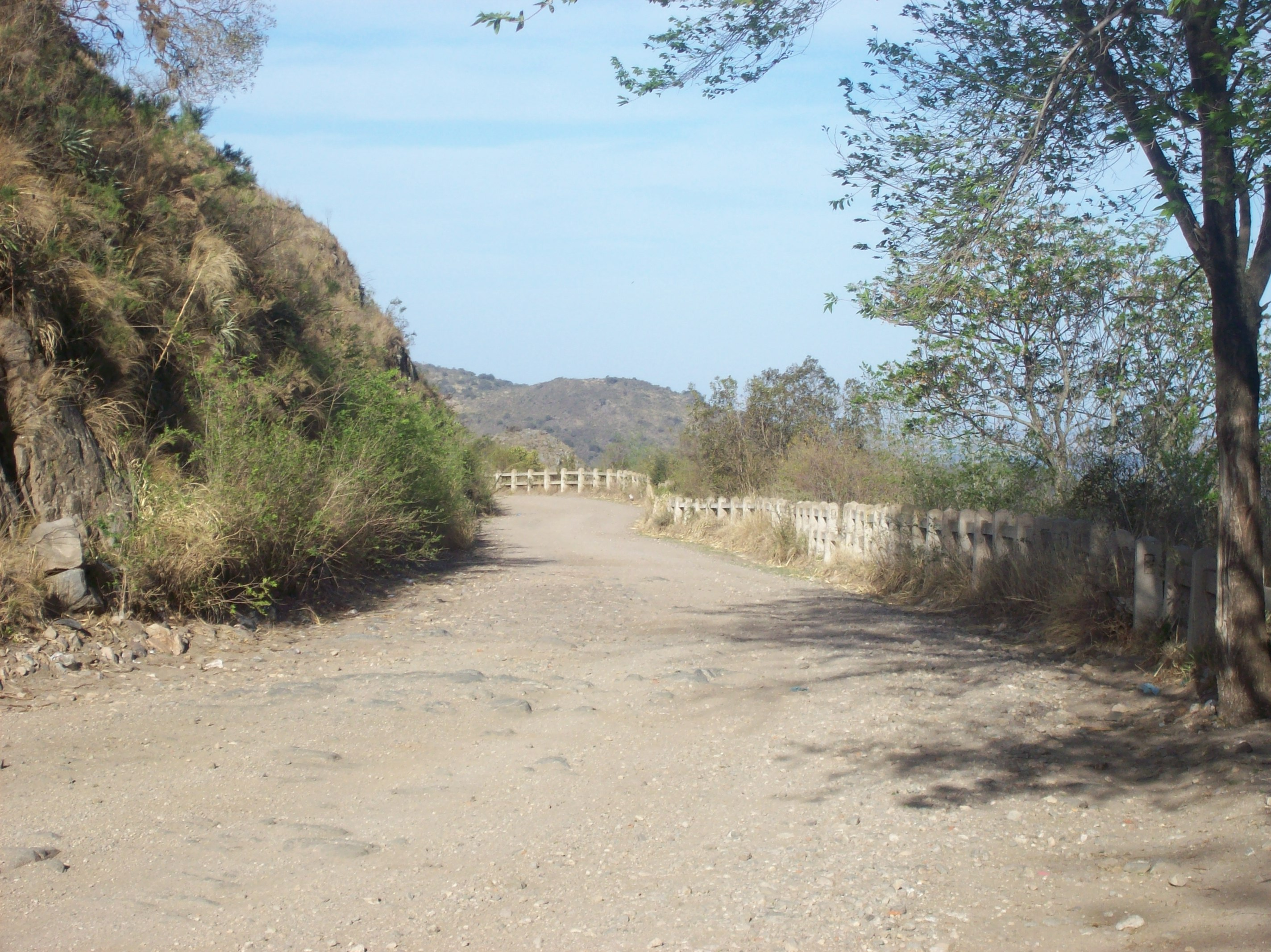 Ruta Provincial E-54 en la base del Cerro Pan de Azúcar en Cosquín, departamento Punilla, provincia de Córdoba, Argentina.